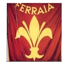 Stendardo del Rione Ferraia